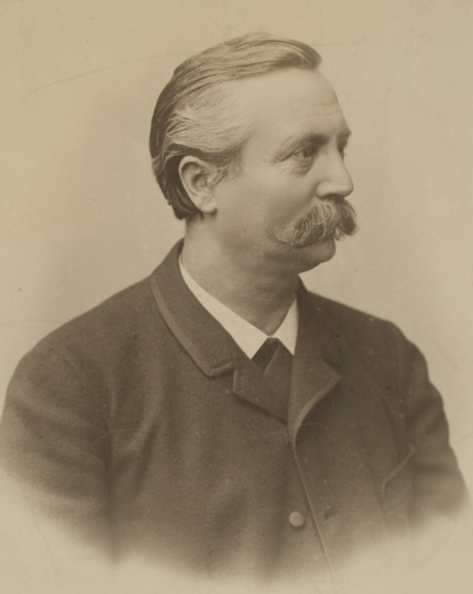 Friedrich Ohlenschlager, 1887–1899 Oberstudienrat in Speyer